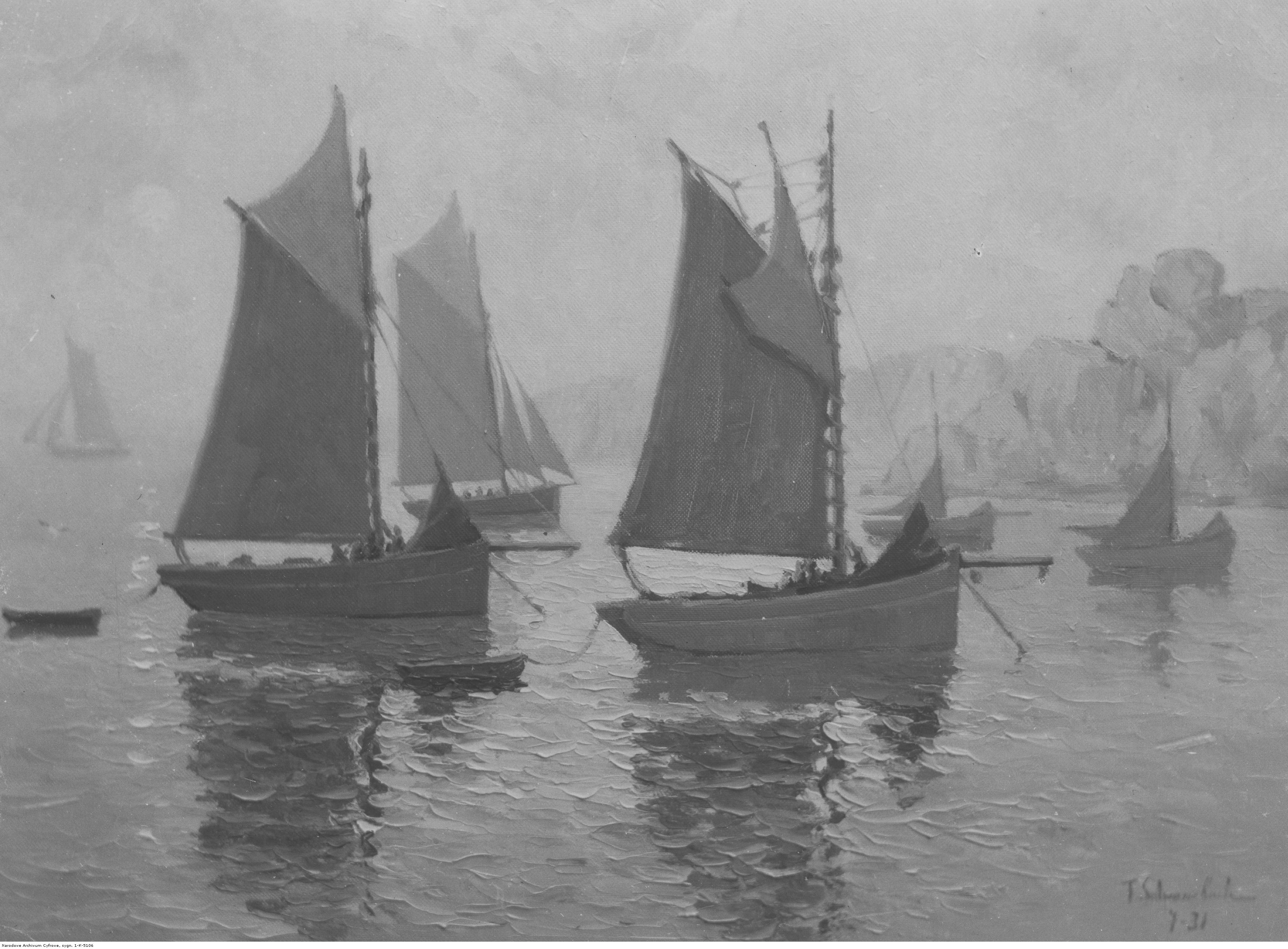 Teodor Schwanebach, Łodzie rybackie, 1931, olej na płótnie, zaginiony.